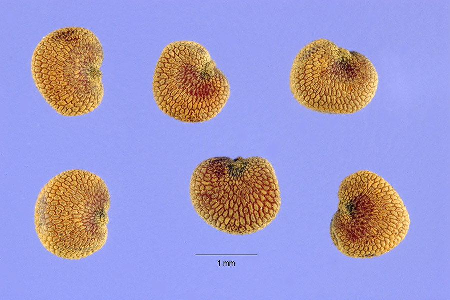 Silene noctiflora